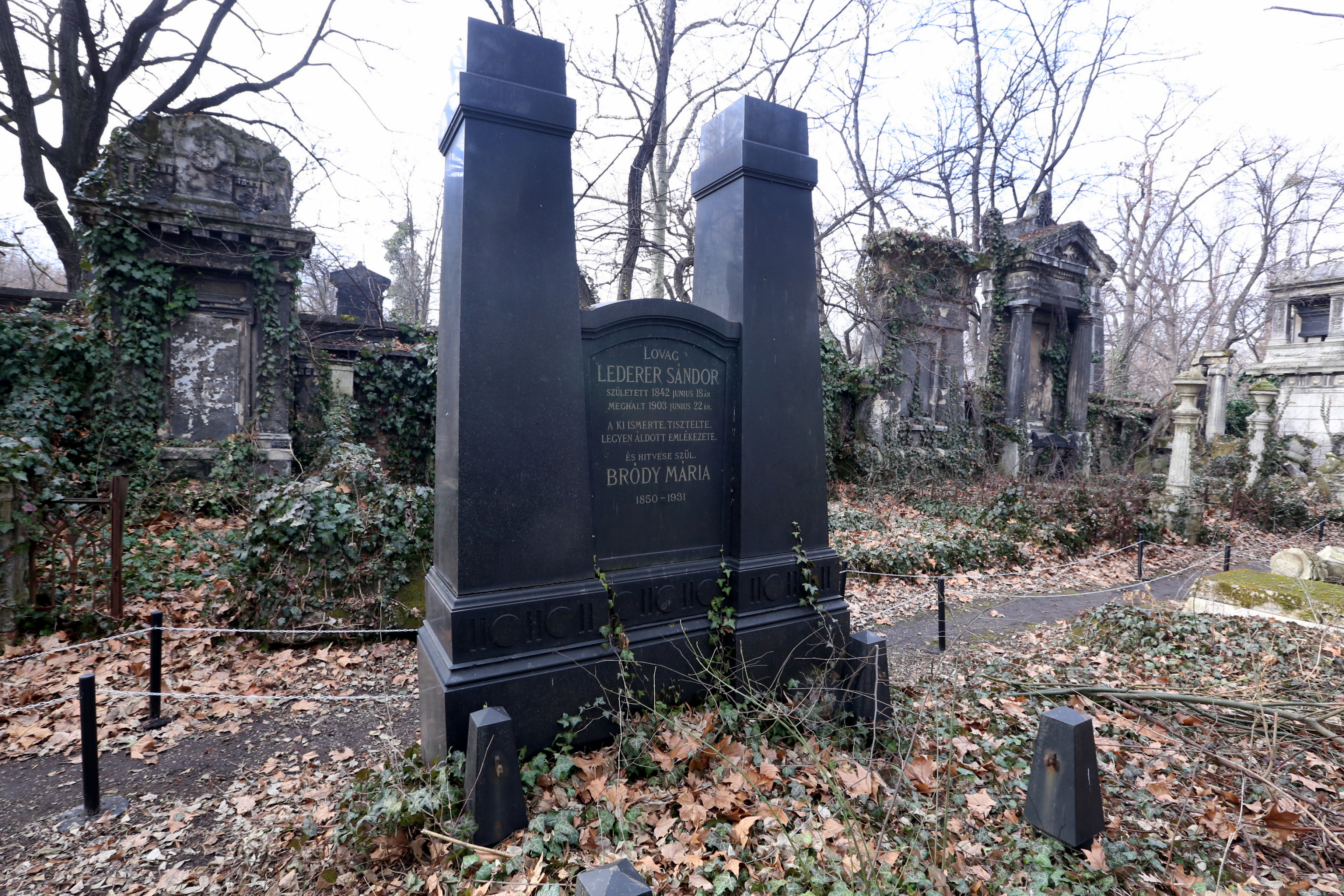 Lederer Sándor síremléke a Salgótarjáni Utcai Zsidó Temetőben